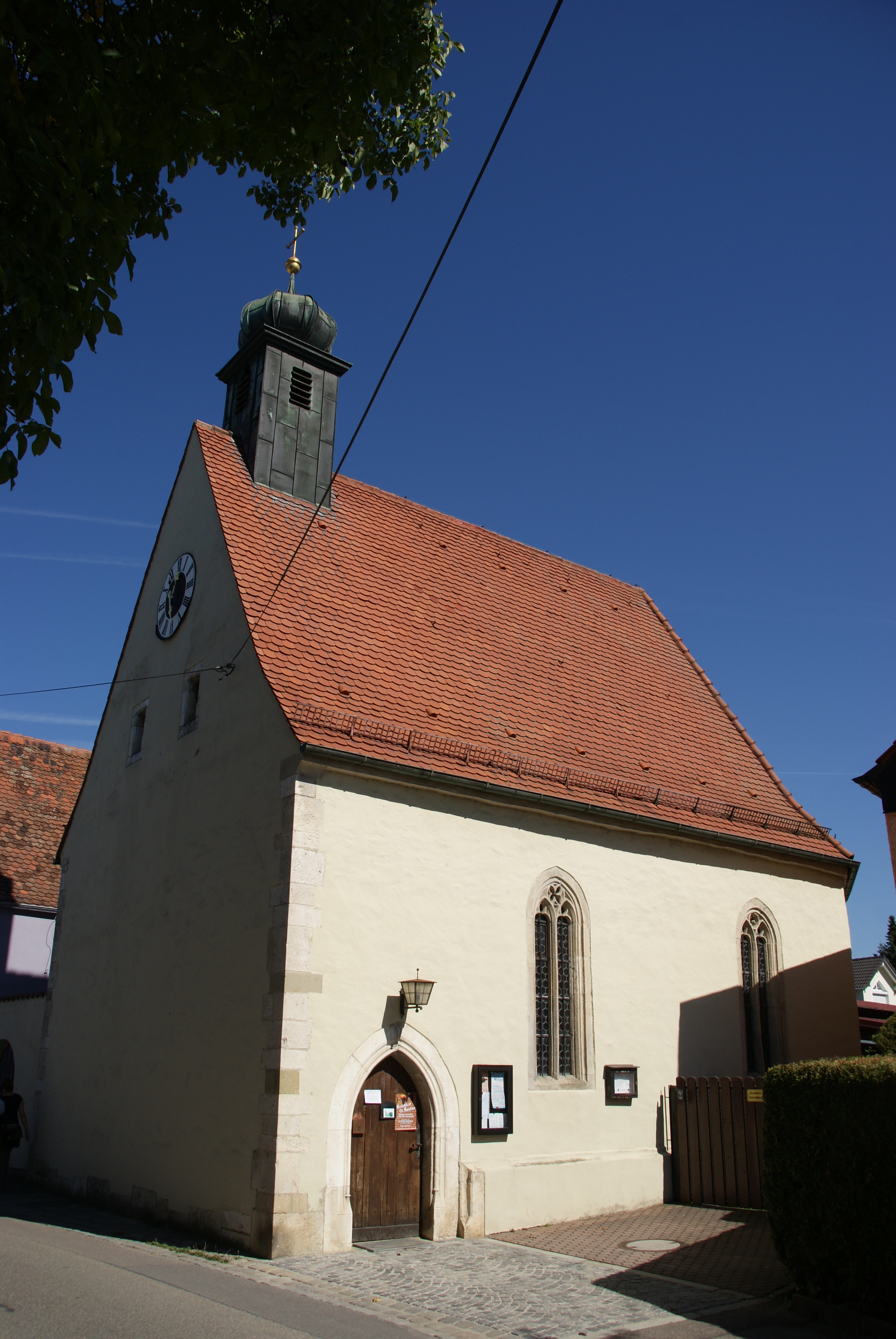 Kath. Filialkirche St. Anna, giebelständiger und polygonal schließender Saalbau mit abgewalmtem Satteldach, spätgotisch, 1487/88, nach schweren Bombenschäden 1945 Wiederaufbau bis 1962; mit Ausstattung This is a photograph of an architectural monument.